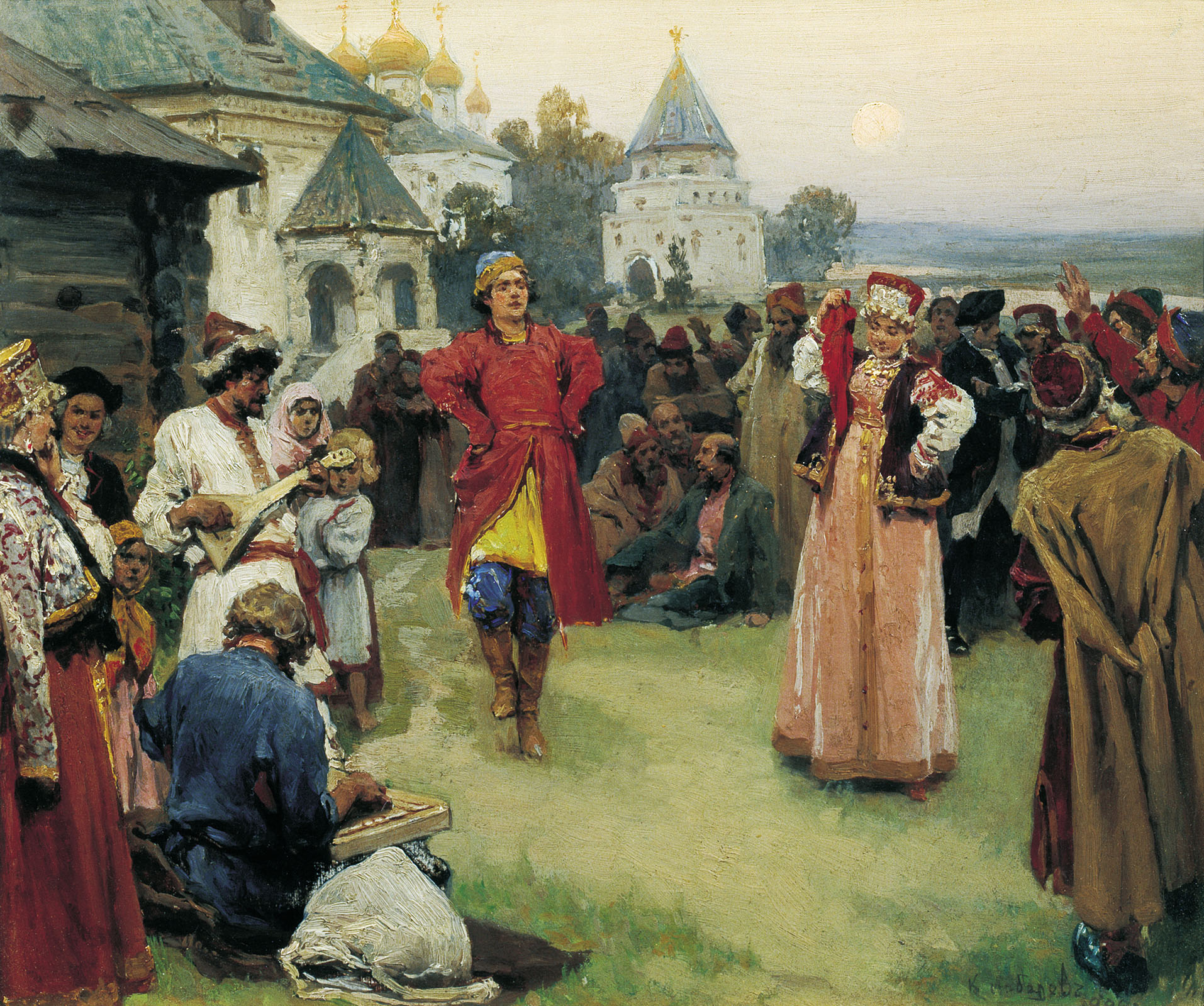 Пляска. 1900. Холст, масло. 26x31 см. Государственный музей искусств им. А.Кастеева Республики Казахстан, Алматы